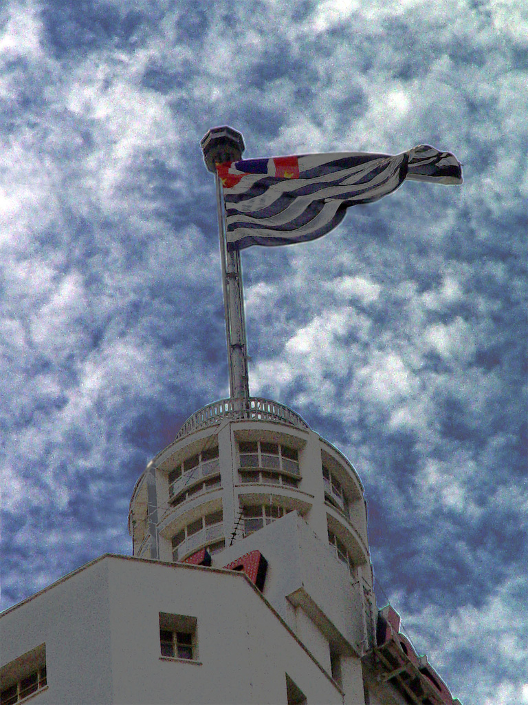 Bandeira do estado de São Paulo no alto do edifício Altino Arantes.